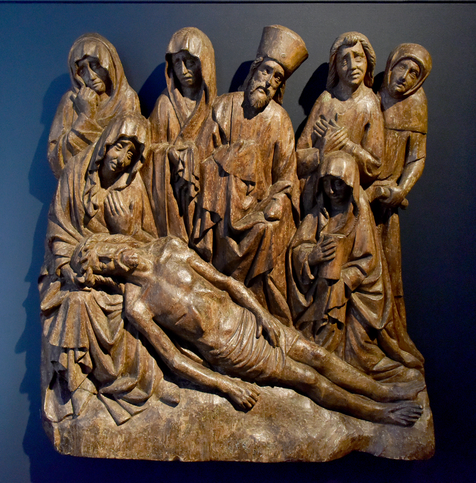 Oplakávání Krista z kostela Panny Marie před Týnem (1420-1430), Mistr Týnské Kalvárie, Muzeum hlavního města Prahy